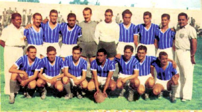 Equipo de Godoy Cruz Antonio Tomba cámpeón de la Liga Mendocina del año 1944.